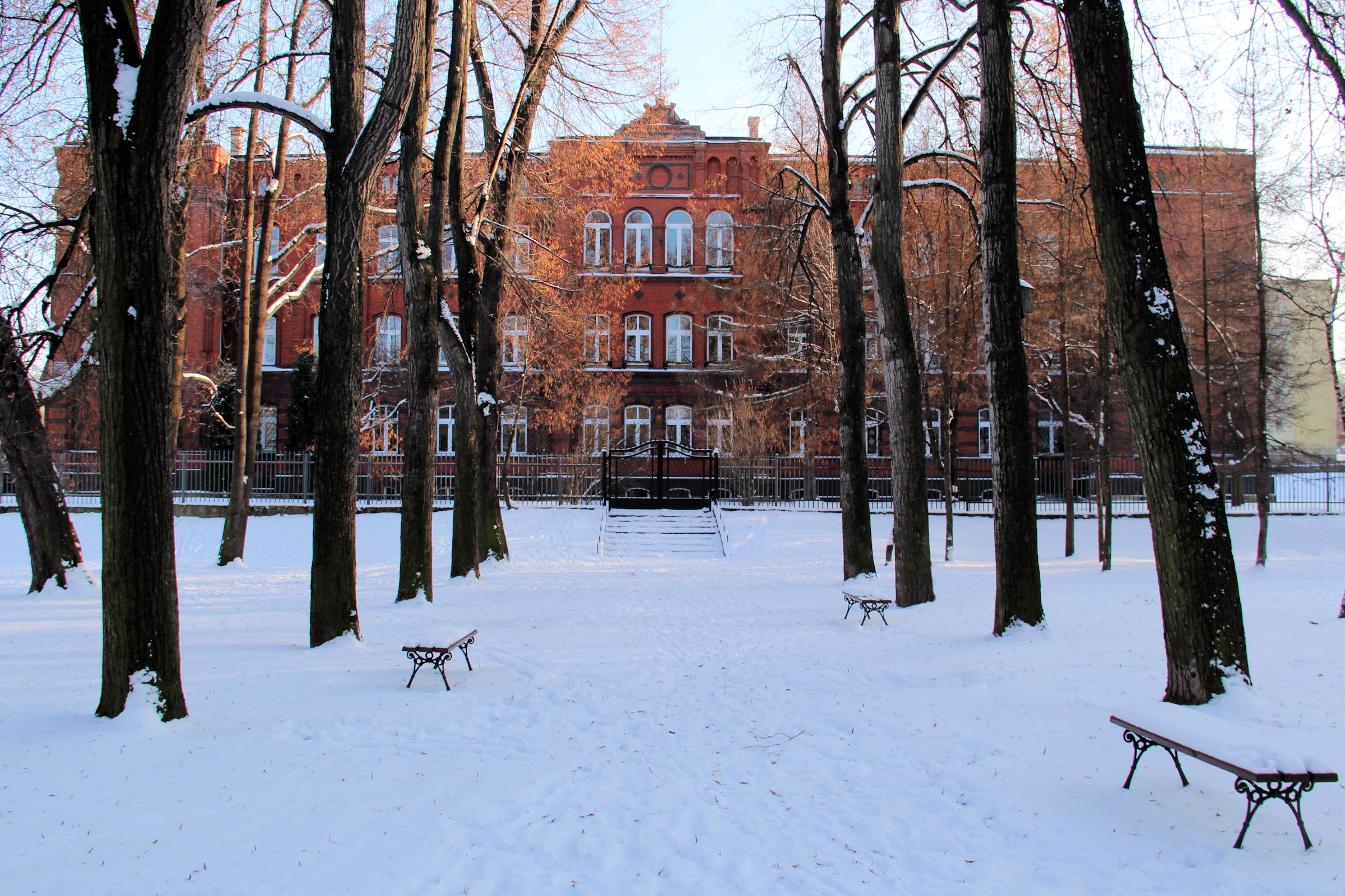 Budynek Zespołu Szkół Ogólnokształcących w Kamiennej Górze.